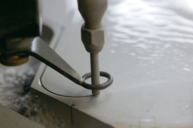 Bystronic Wasserstrahlschneiden